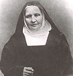 Marie Hébert de La Rousselière (Angers, 1840-1924) Nom de religion : Marie-Clémentine de Jésus-Hostie Elle fonde en 1896 le sanctuaire et le pélerinage dédiés à la Réparation au Sacré Coeur à Montréal.